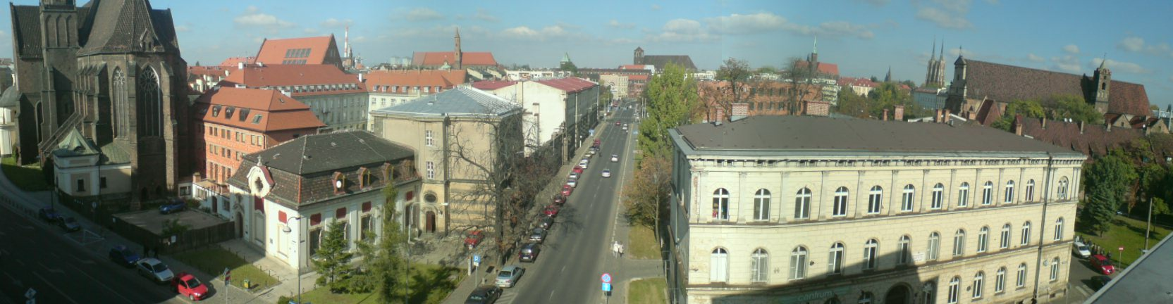 Widok na ul. Kraińskiego - nucek